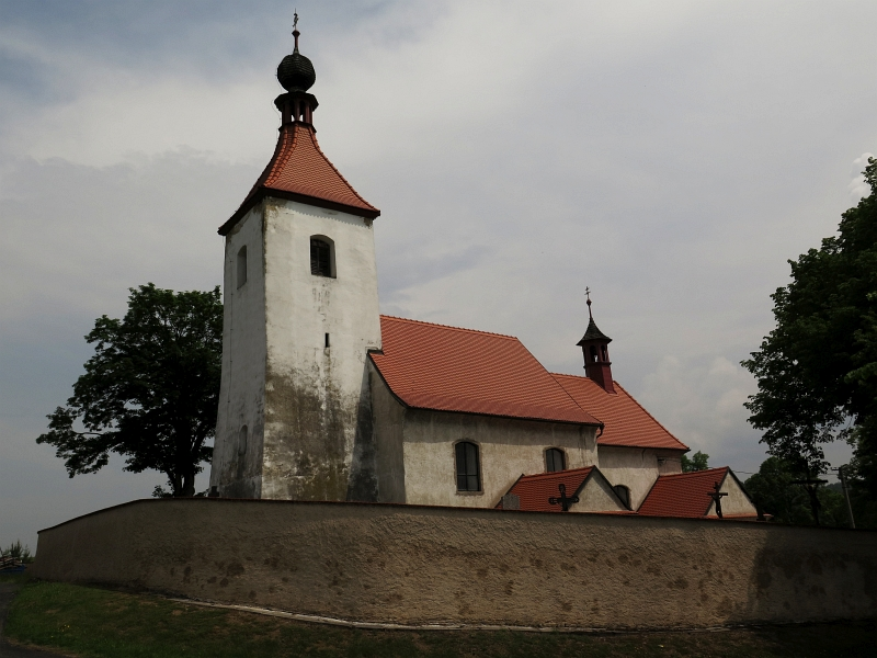 Kostel svatého Havla, Šebířov.